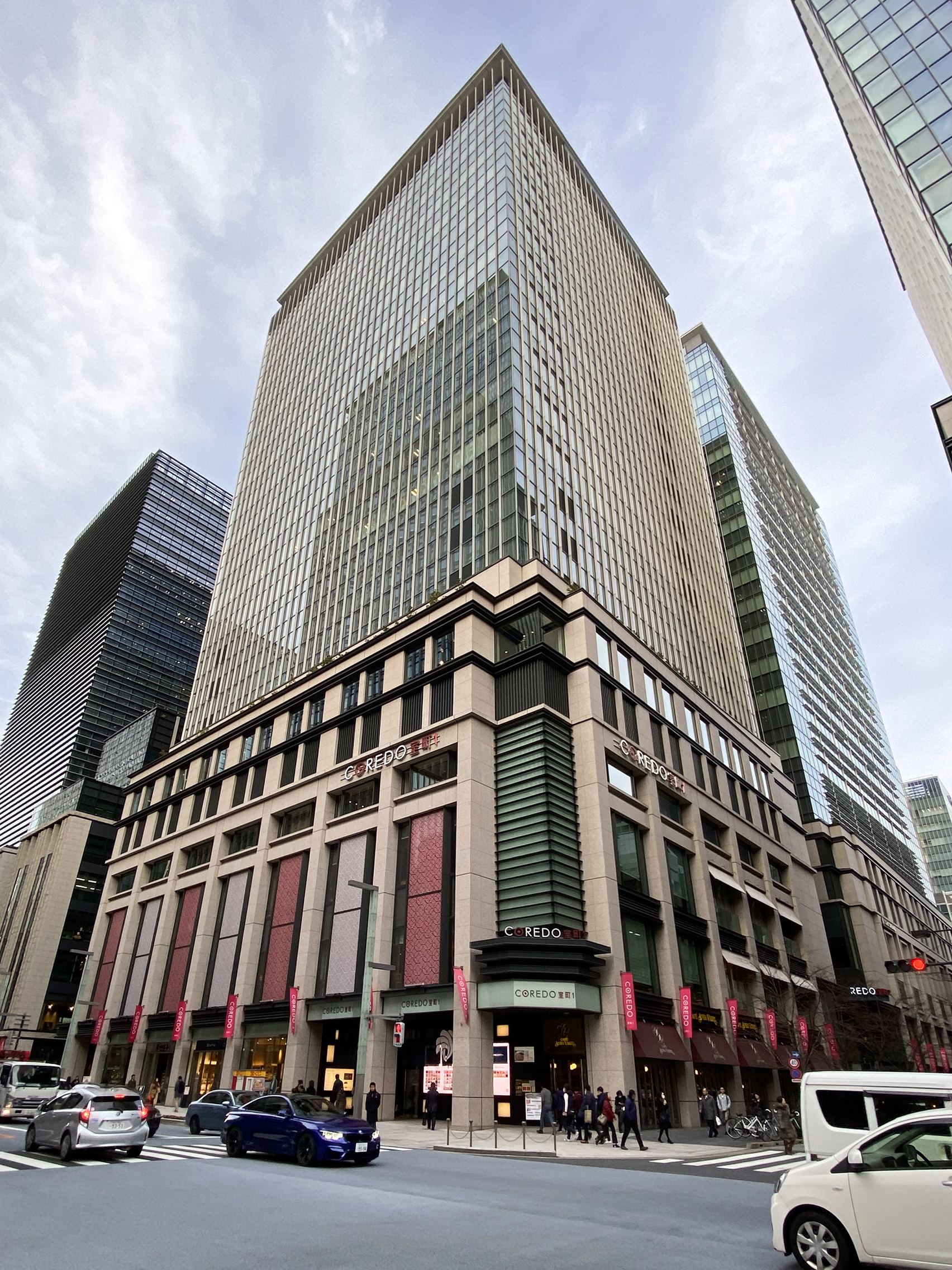 室町東三井ビルディング